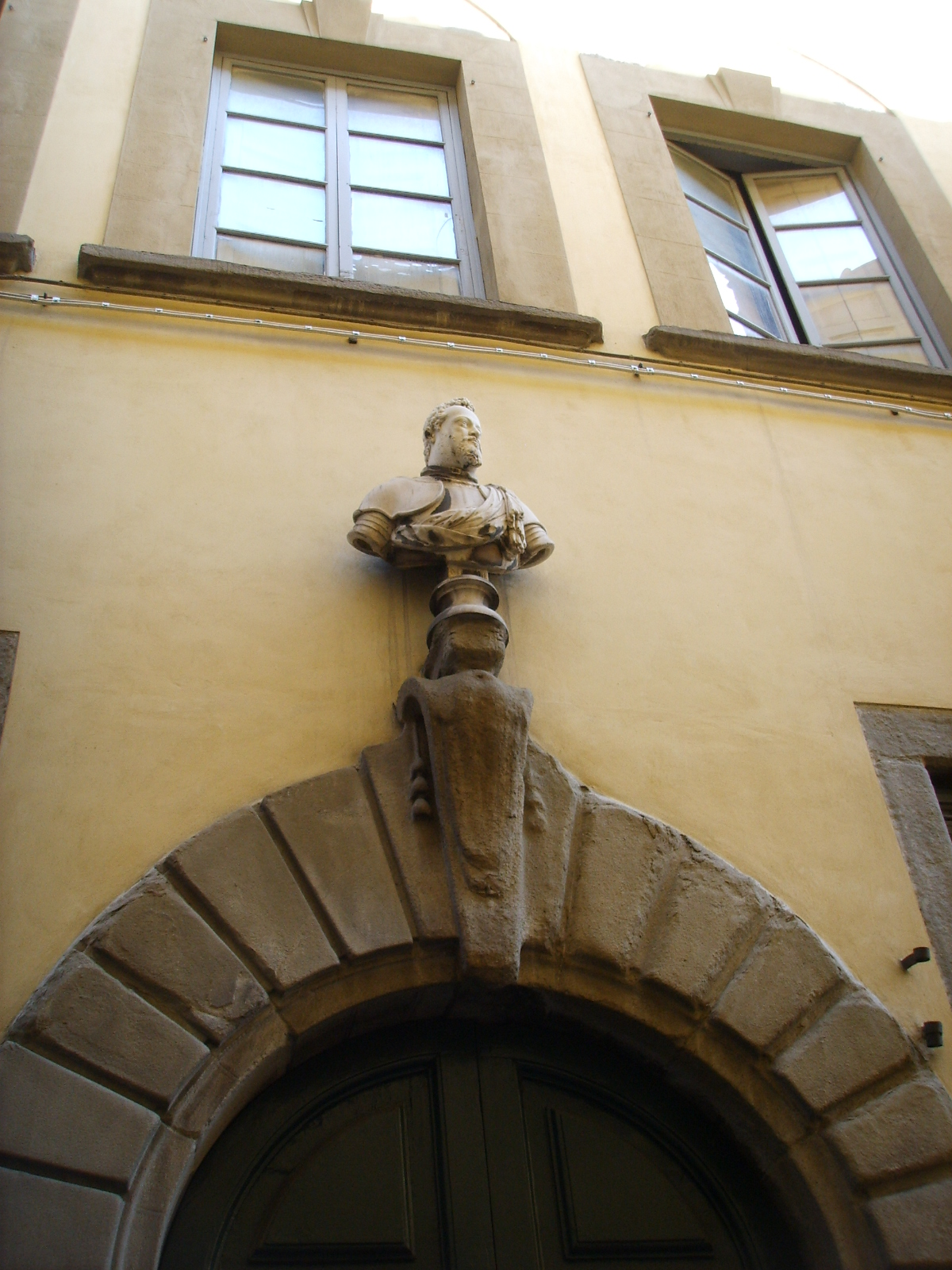 Palazzo_del Giambologna in Florence